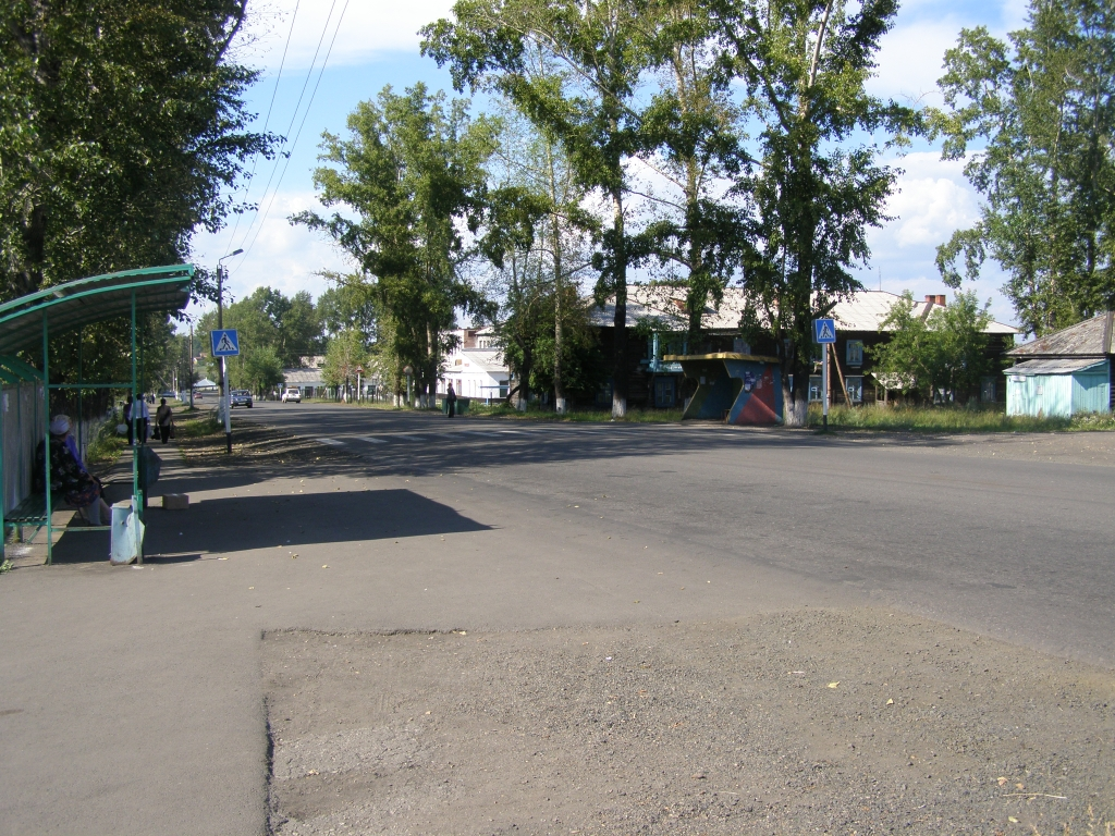 город Берёзовский Кеморовской области